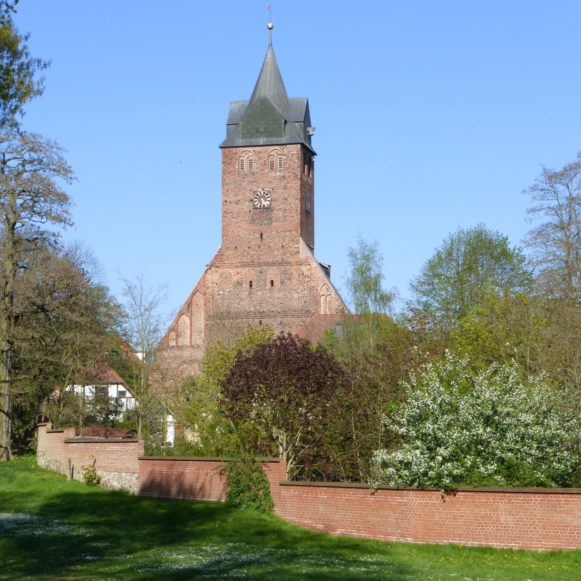 Nikolaikirche in Gardelegen (Altmark) von Westen